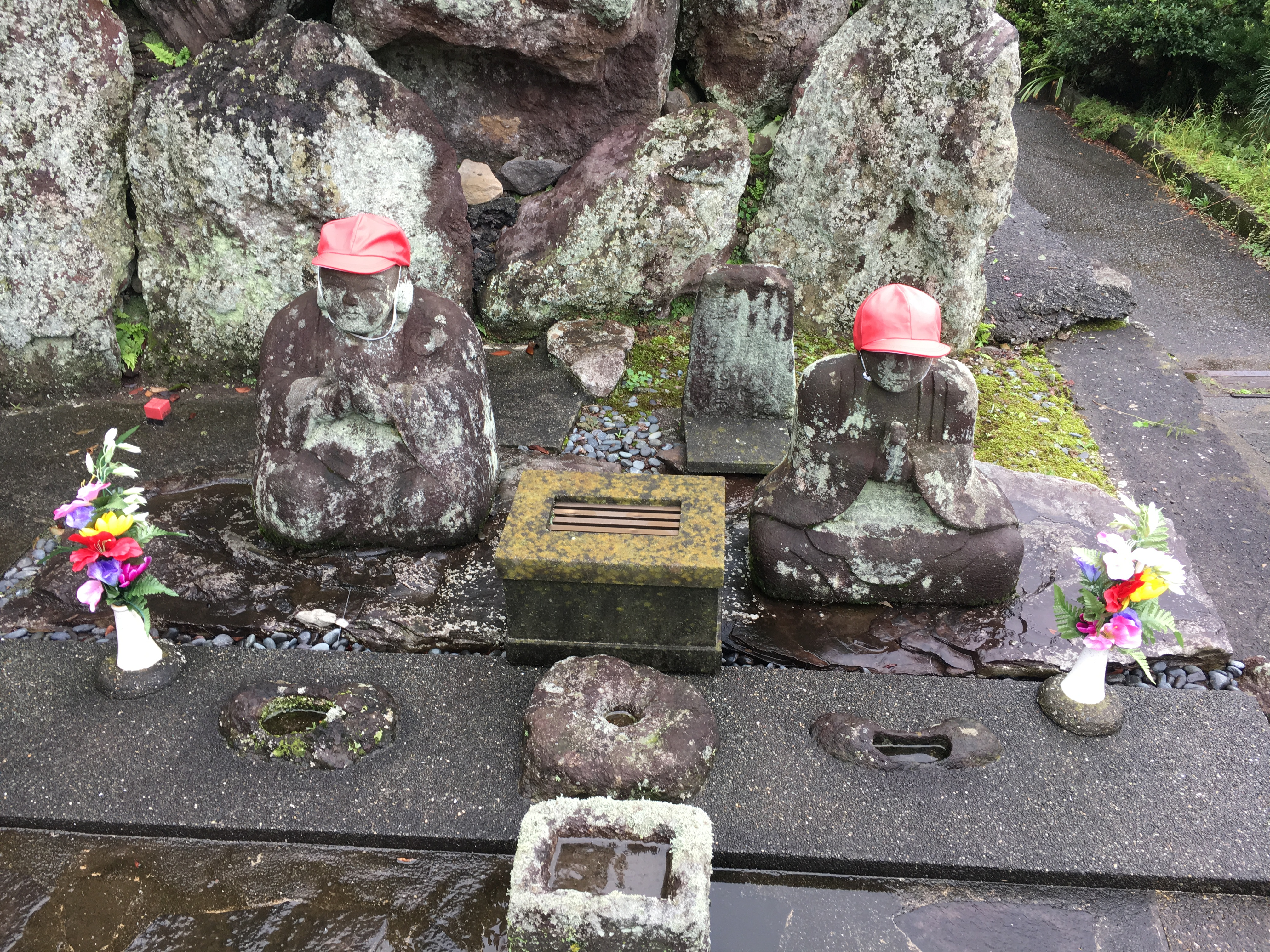 細山の道祖神